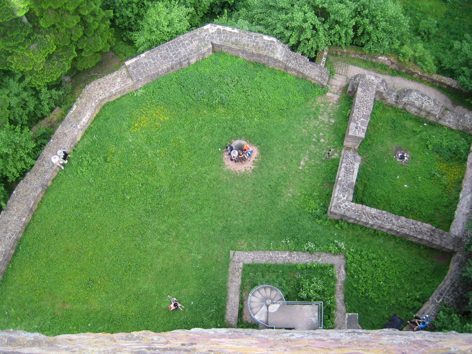 Blick vom 35 m hohen Bergfried in den Burghof mit Palas, Zisterne und Schildmauer.